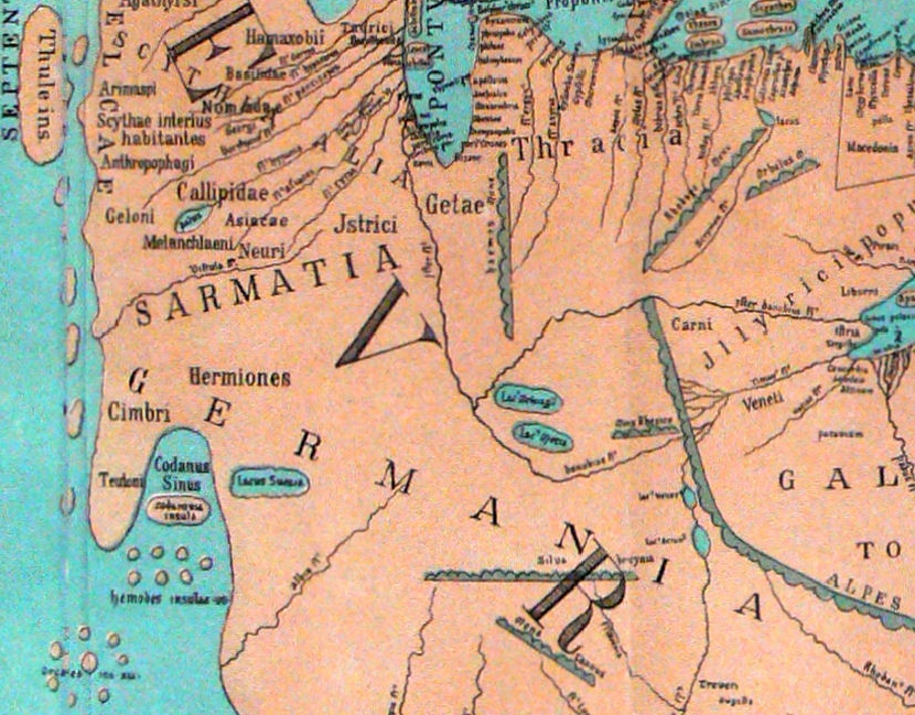 CODANUS SINUS, Detailbild von der Weltkarte des Pomponius Mela. Als Codanus sinus ist hier die kleine Bucht links in der Karte unter den ersten beiden Buchstaben der Beschriftung "GERMANIA" bezeichnet.